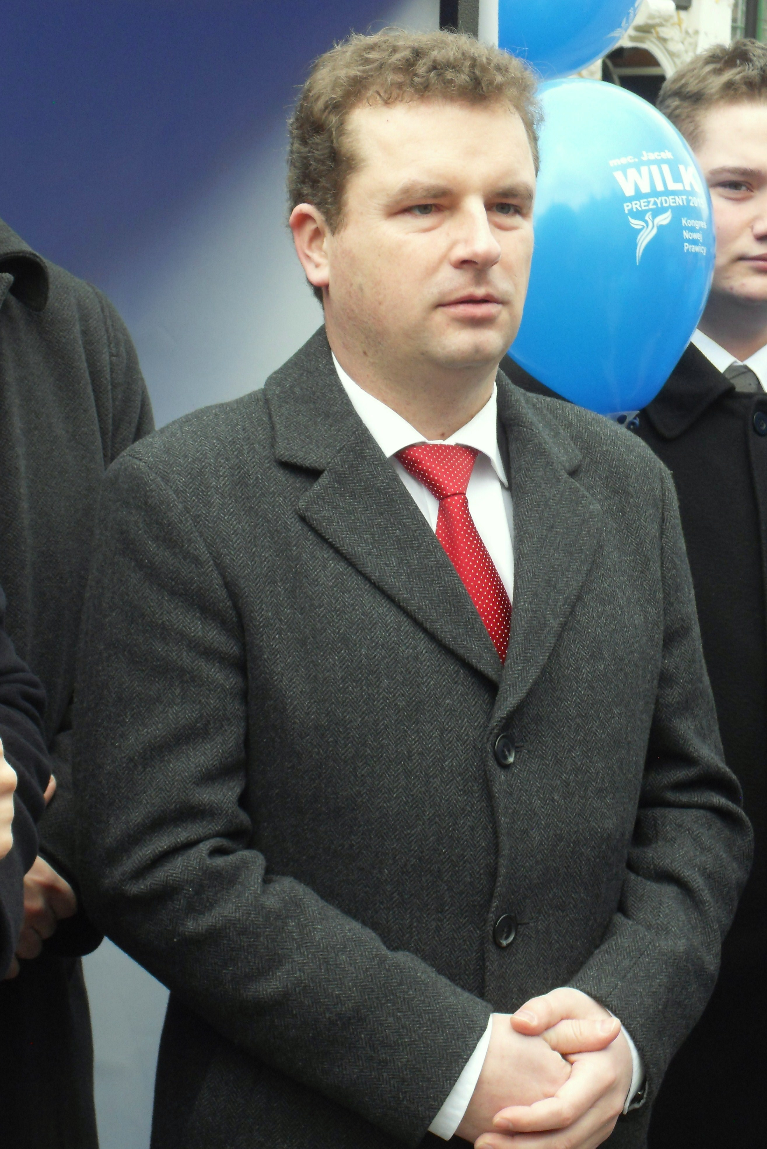 Jacek Wilk (adwokat, prawicowy ekonomista i polityk) na spotkaniu przedwyborczym (wybory prezydenckie) w Gdańsku.